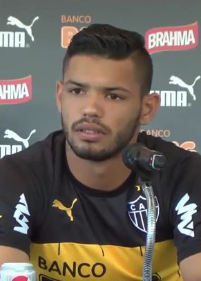 Карлос — бразильский футболист